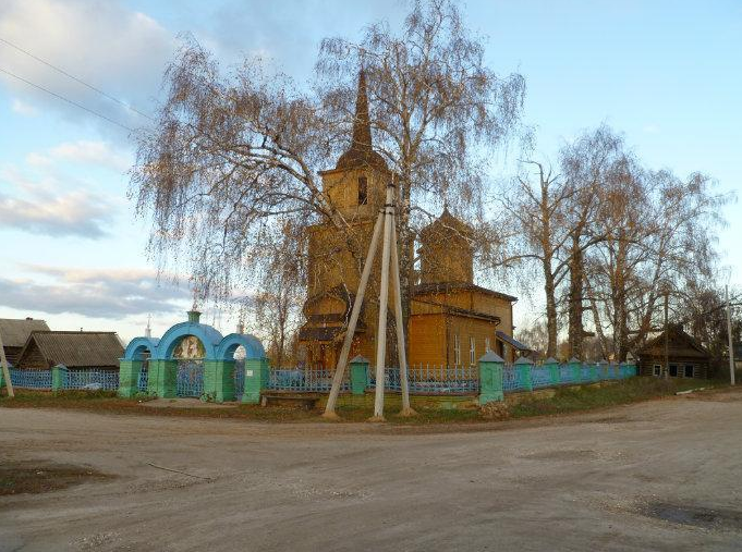 Разнежская церковь. Она находится на улице Советская. Около пожарной части и "Песков". Основана в 1320 году.